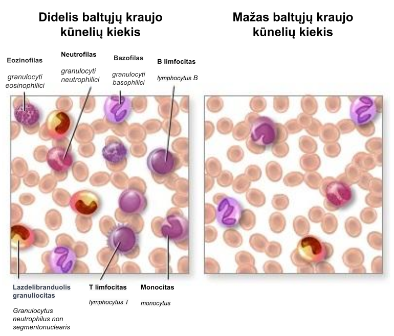 Baltųjų kraujo kūnelių skaičiaus skirtumai